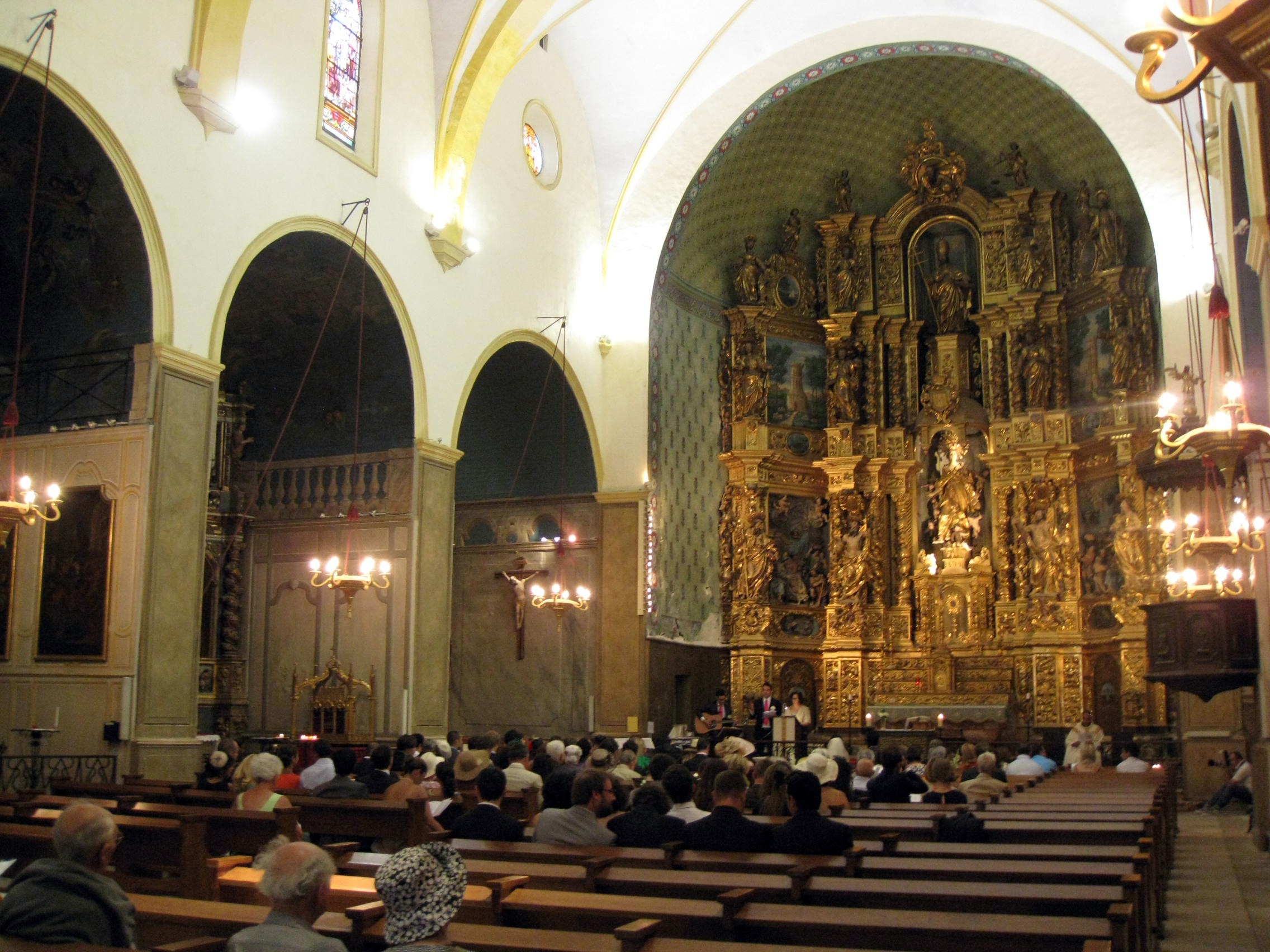 Església de Santa Maria i torre contigua amb rellotge (Cotlliure)